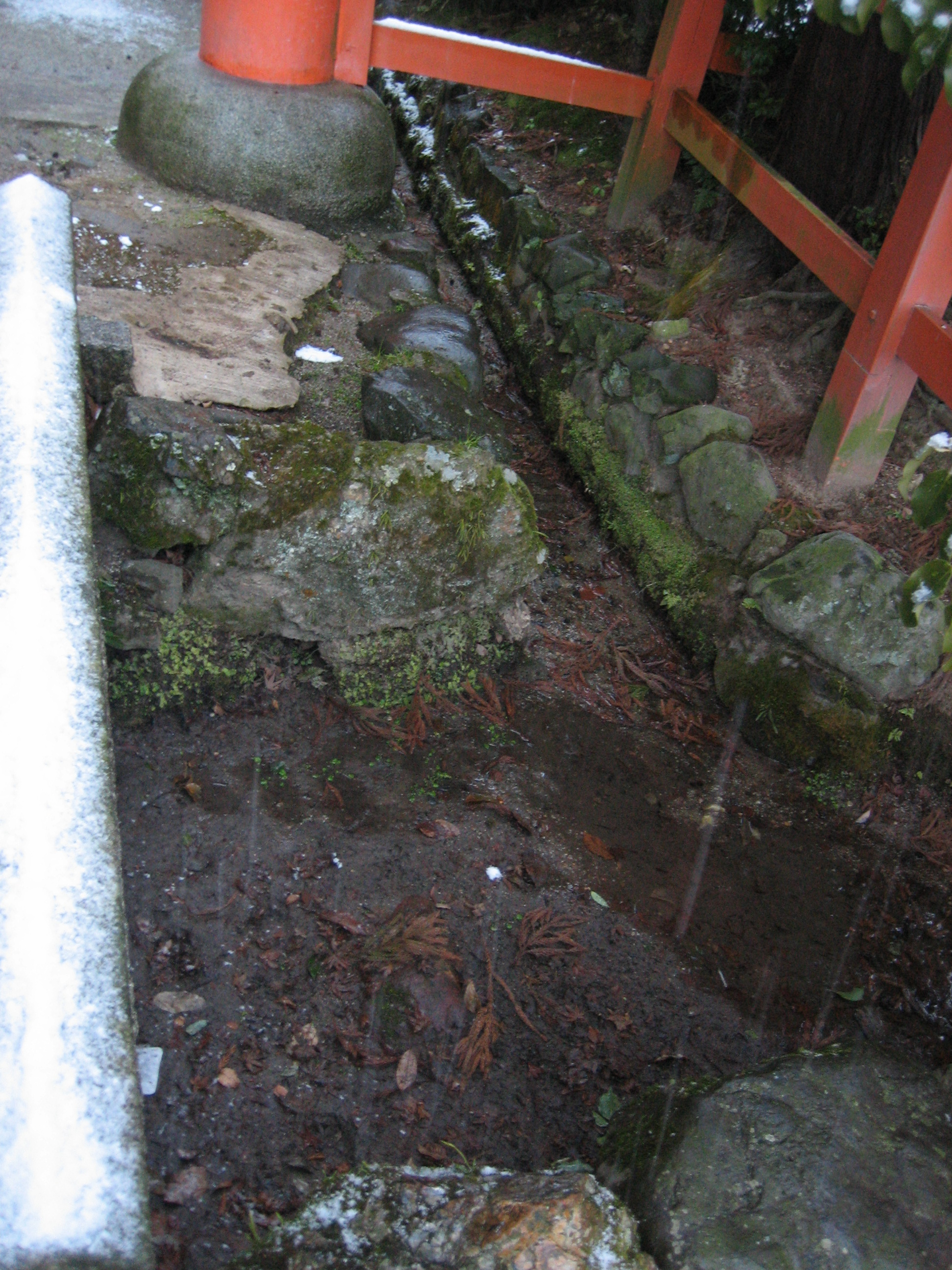 大田神社の「蛇の枕」を鳥居前から撮影